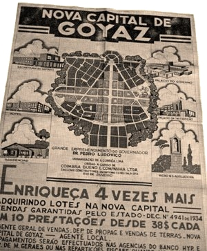 Cartaz anunciando a venda de lotes na época da construção de Goiânia.